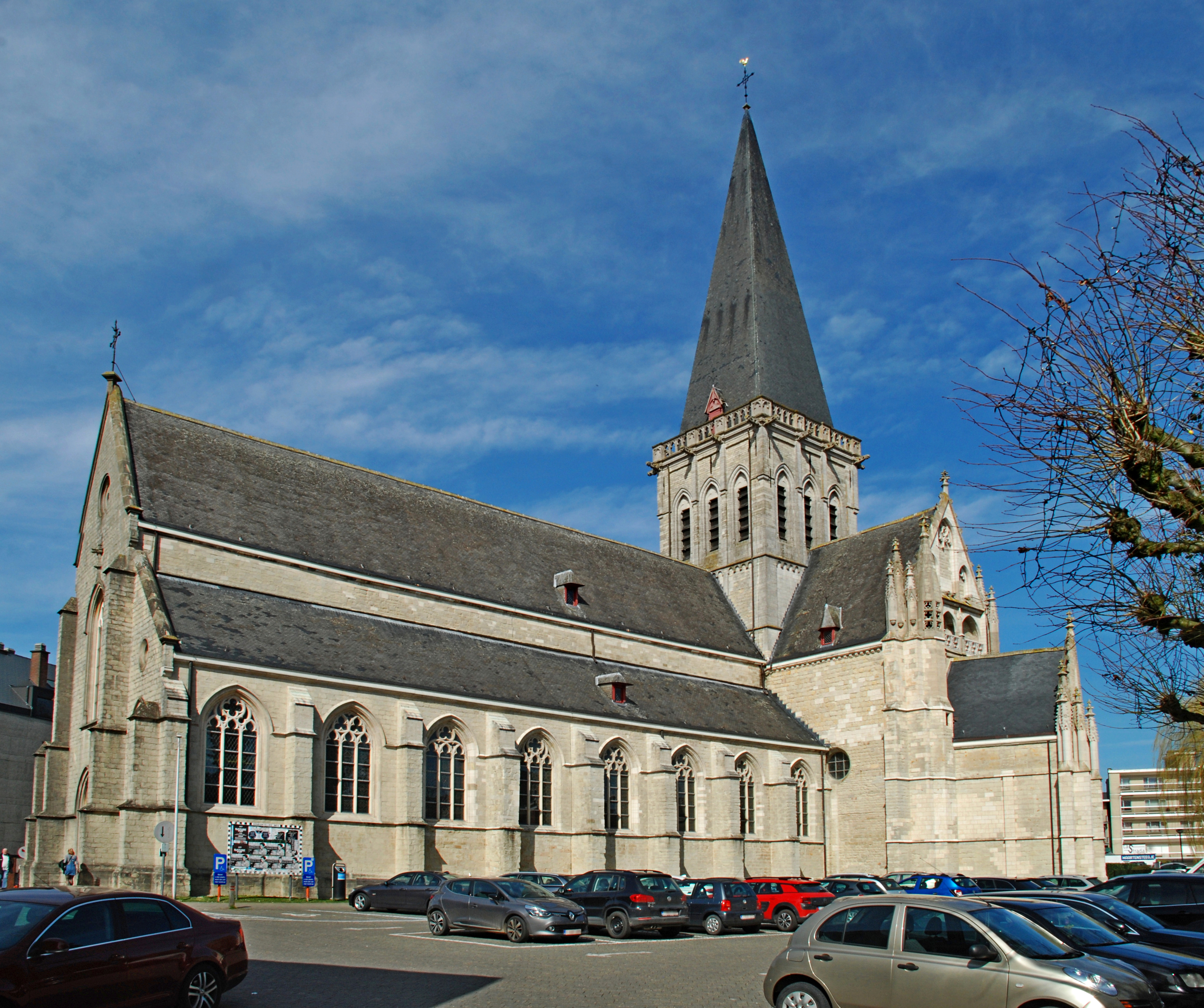 België - Vlaams Brabant - Asse - Sint-Martinuskerk